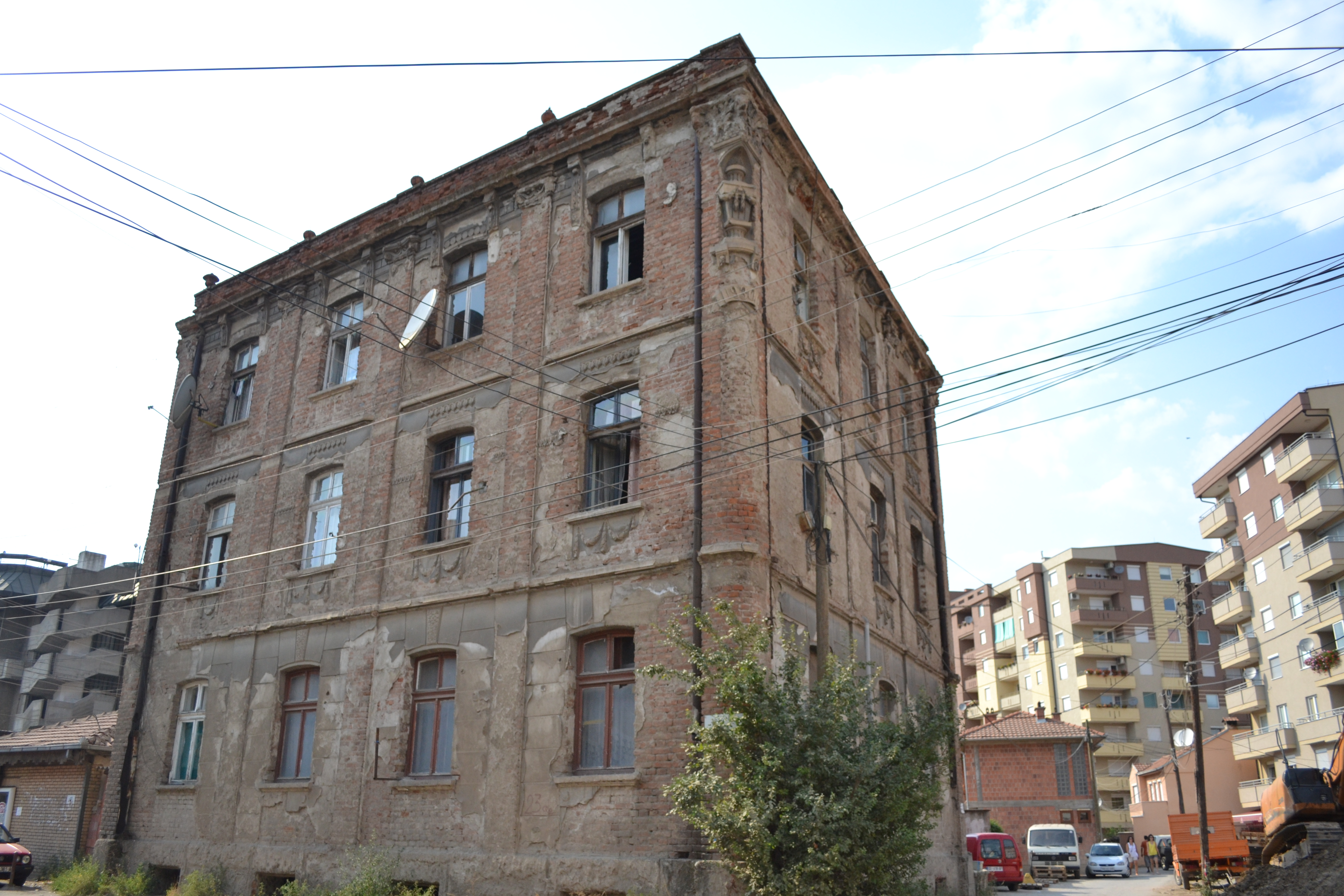 Njëra prej ndërtesave më të vjetra në Mitrovicë